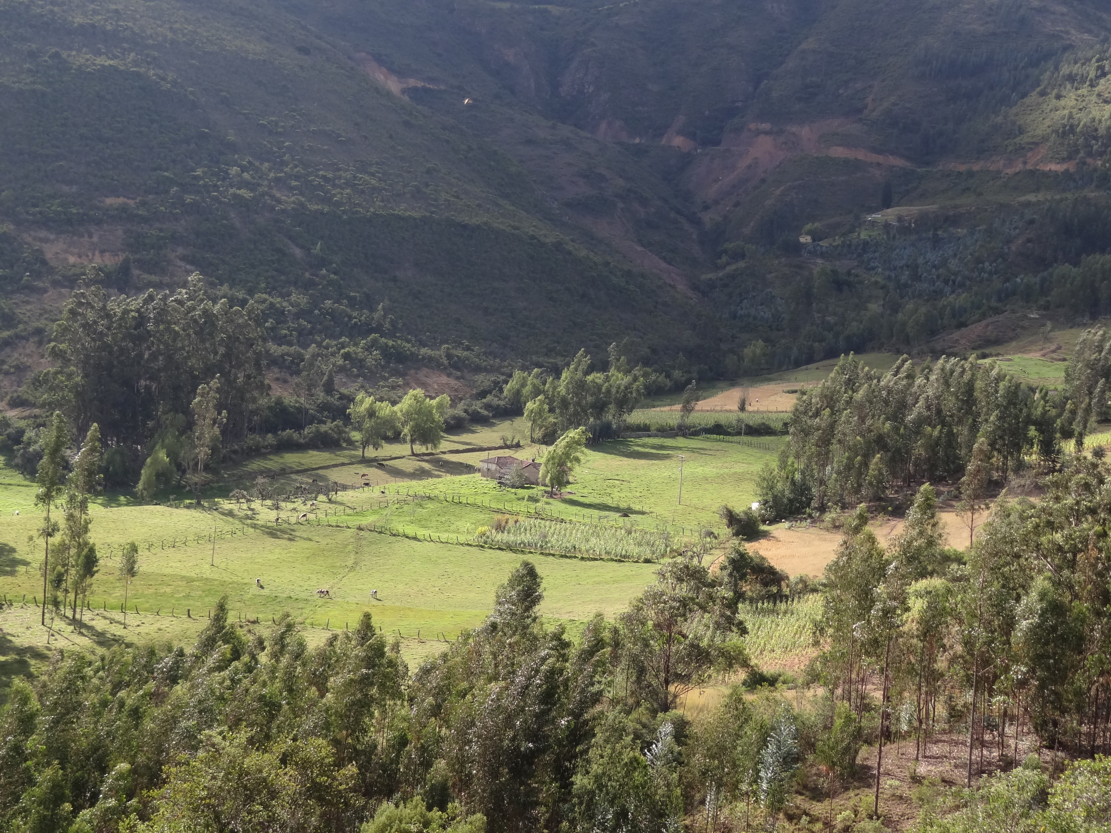 Parcelas ganaderas y agrícolas en el municipio de Floresta, departamento de Boyacá, Colombia